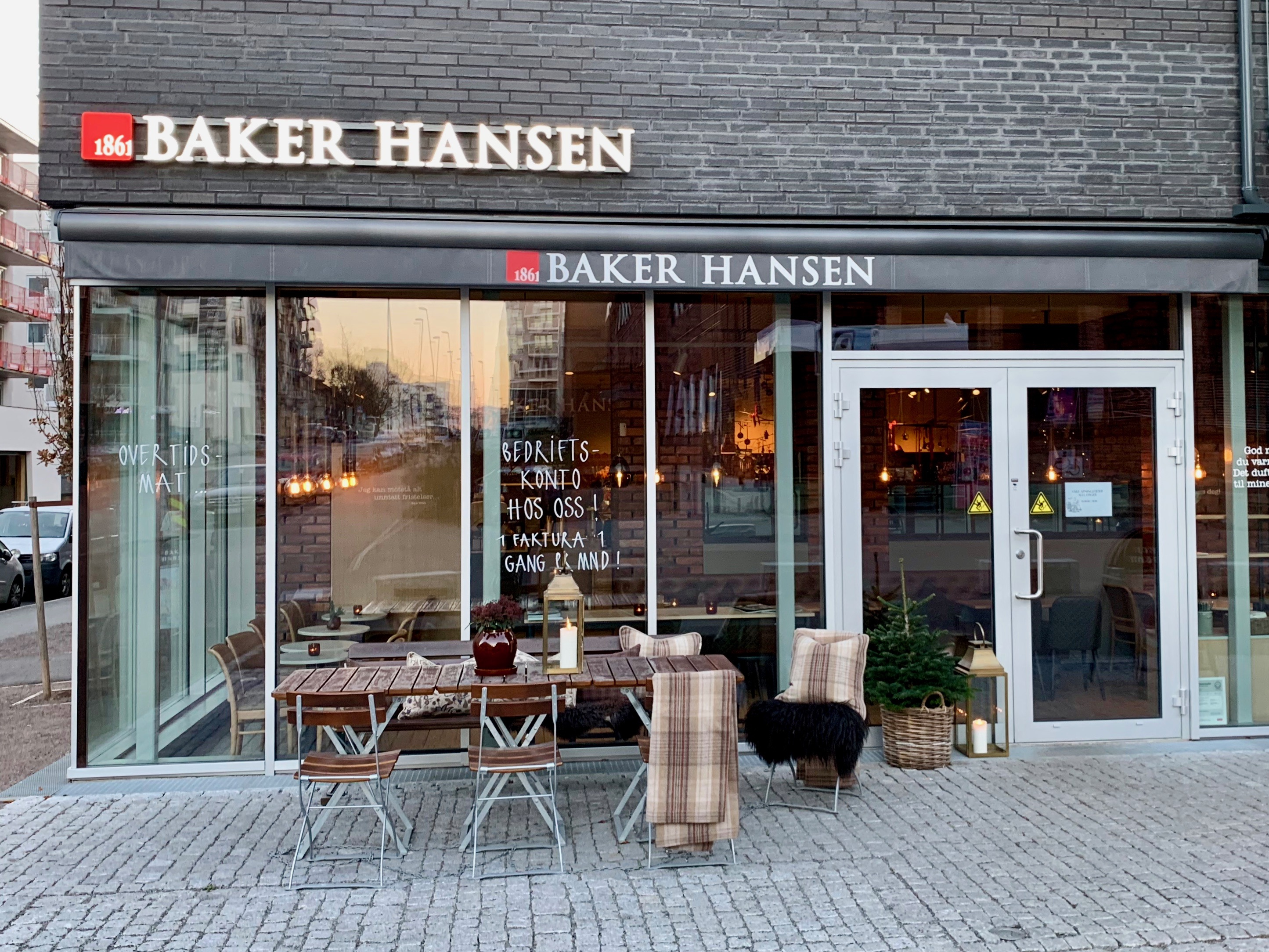 Baker Hansen på Løren i Oslo.